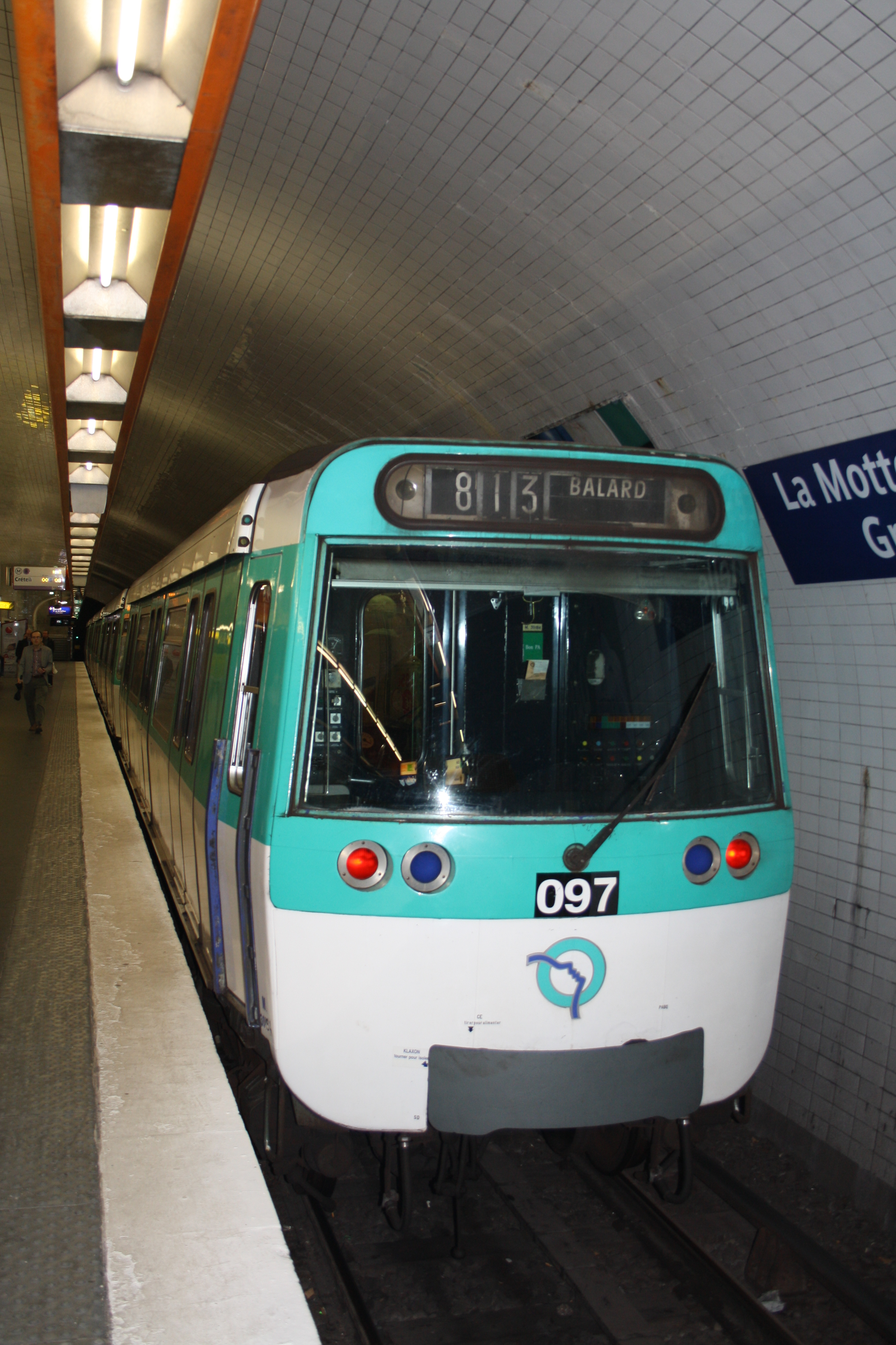 Métrostation La Motte-Picquet – Grenelle mit MF 77